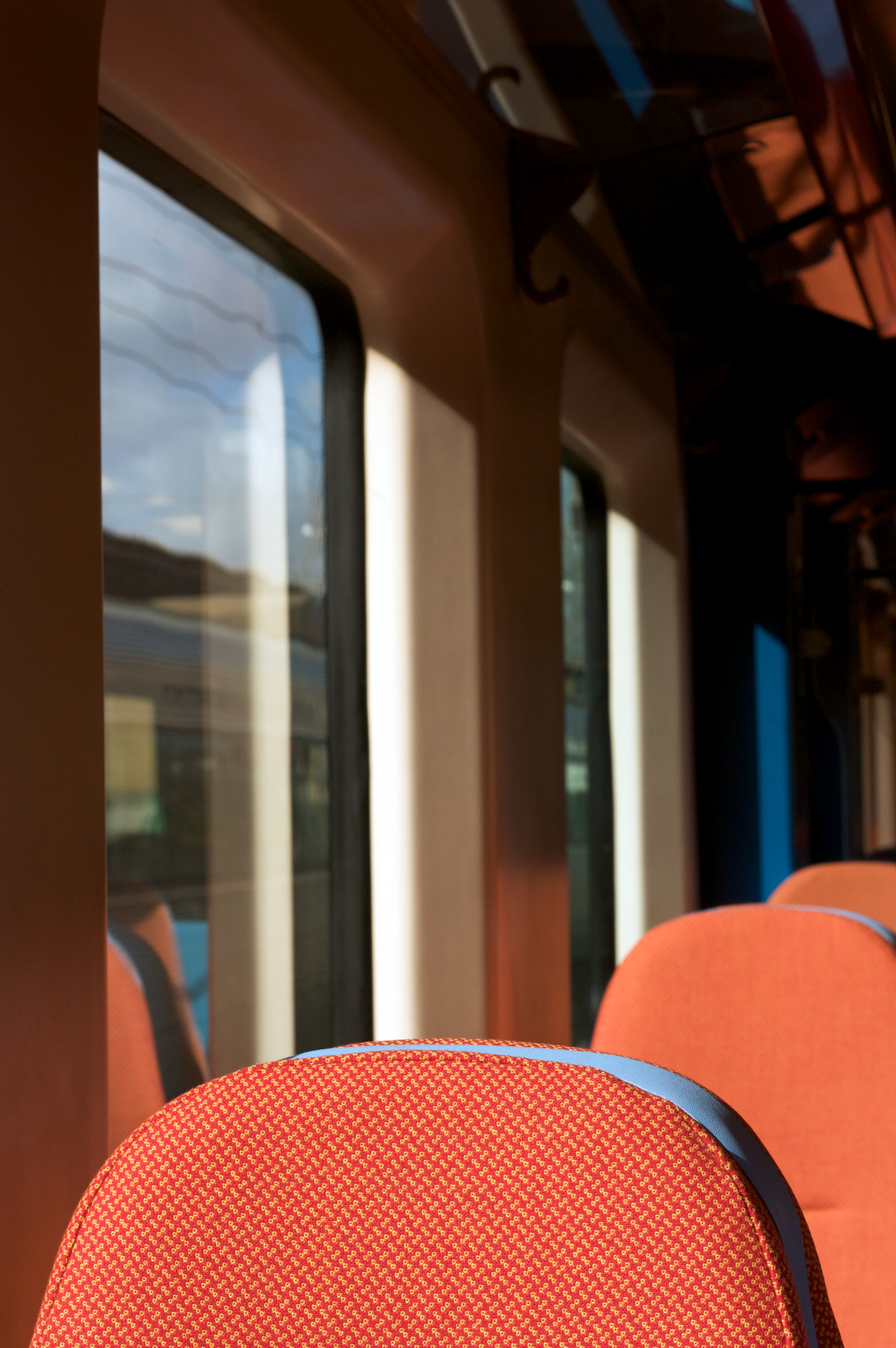 pormenor do interior da UTE. Tipo: Comboio Regional 6606/7 [Coimbra - Pampilhosa] Local: Estação de Coimbra [Ramal da Lousã, PK 1] Data e hora: 27 de Junho de 2008 [17h55] Material: Automotora 2280 [Unidade Tripla Eléctrica]